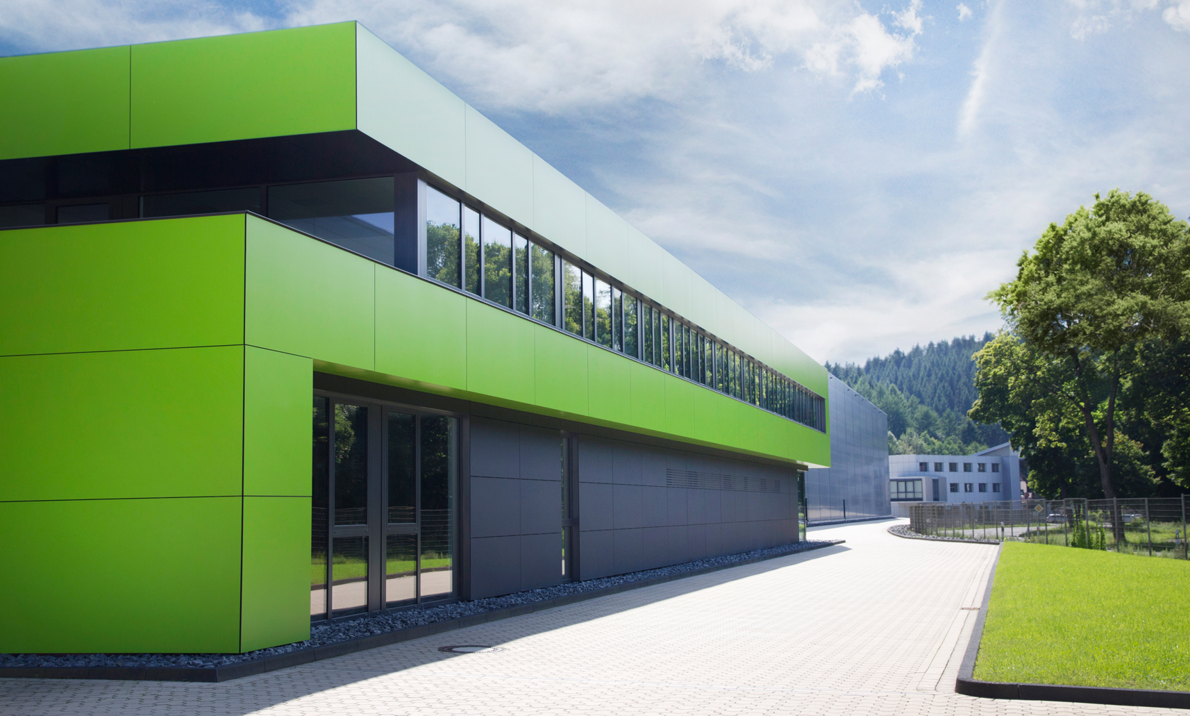 Ein Gebäude gefertigt in Modulbauweise, bestehend aus 12 einzelnen Modulen.